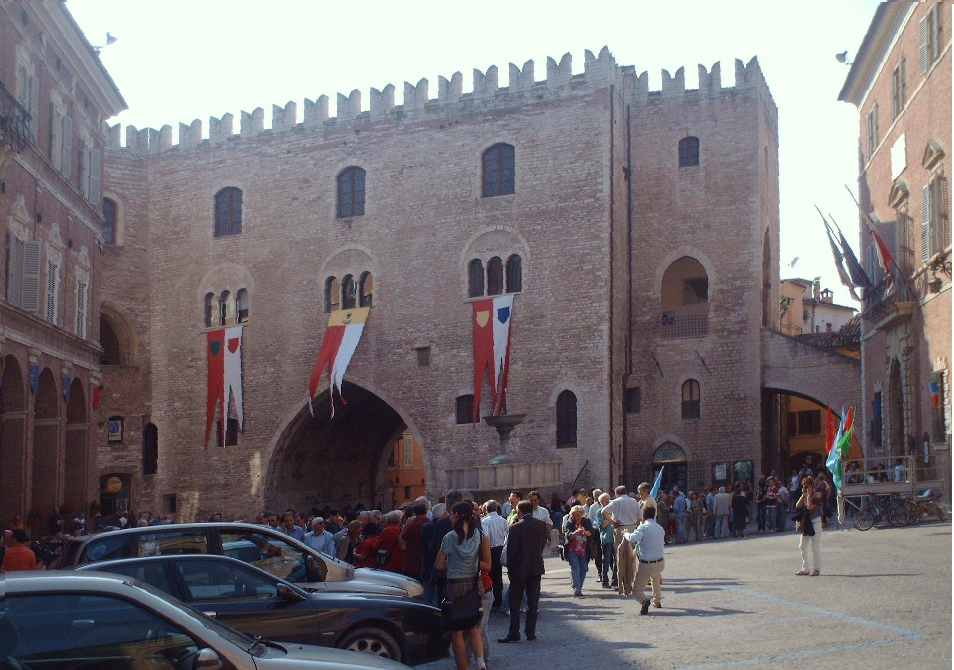 c'est une photo de la place centrale de Fabriano avec le palais du Podesta prise lors des élections municipales de 2007